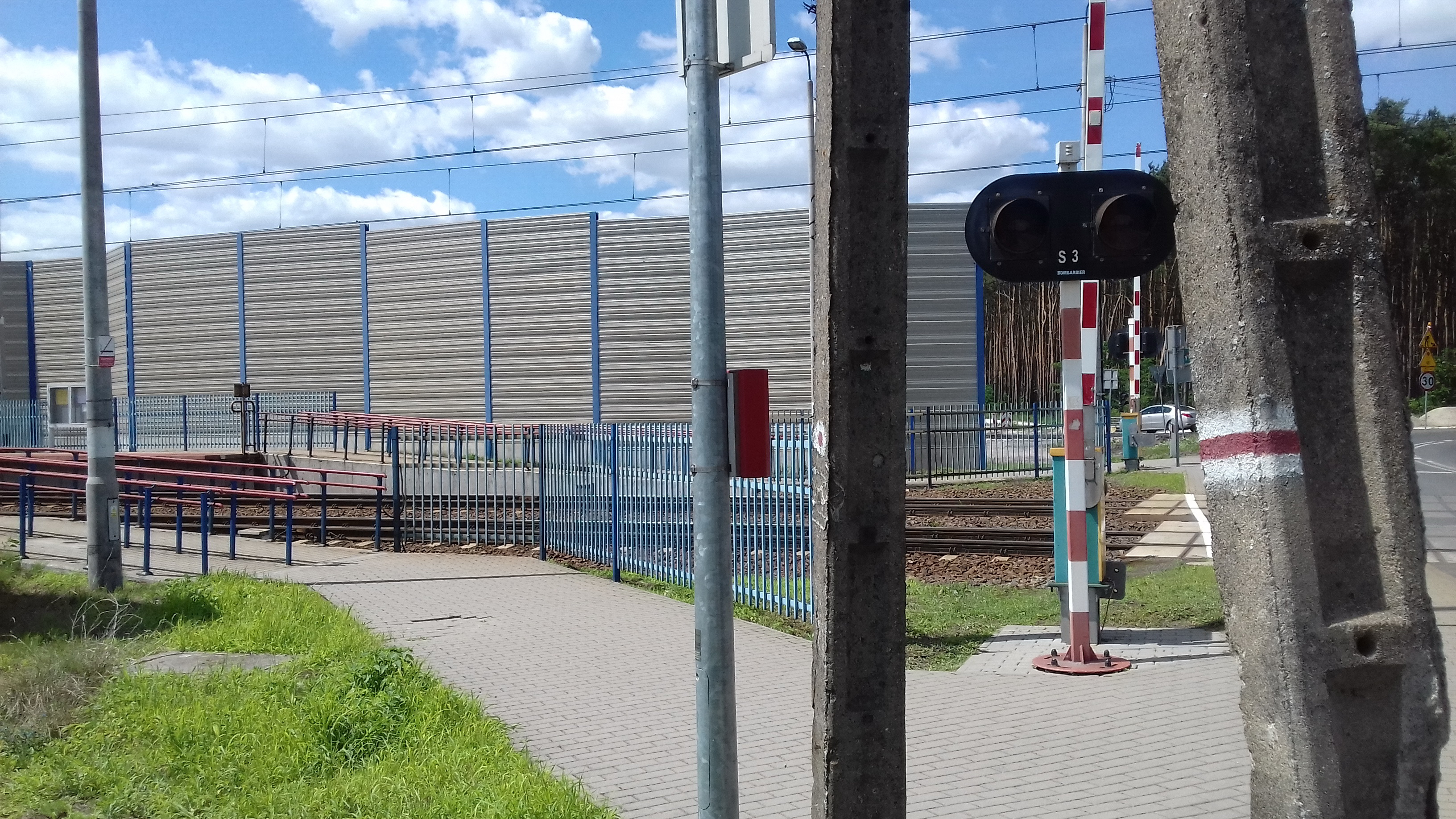 Oznaczenie początku szlaku nr 3578 (czerwonego) przy stacji kolejowej Drużyna Poznańska